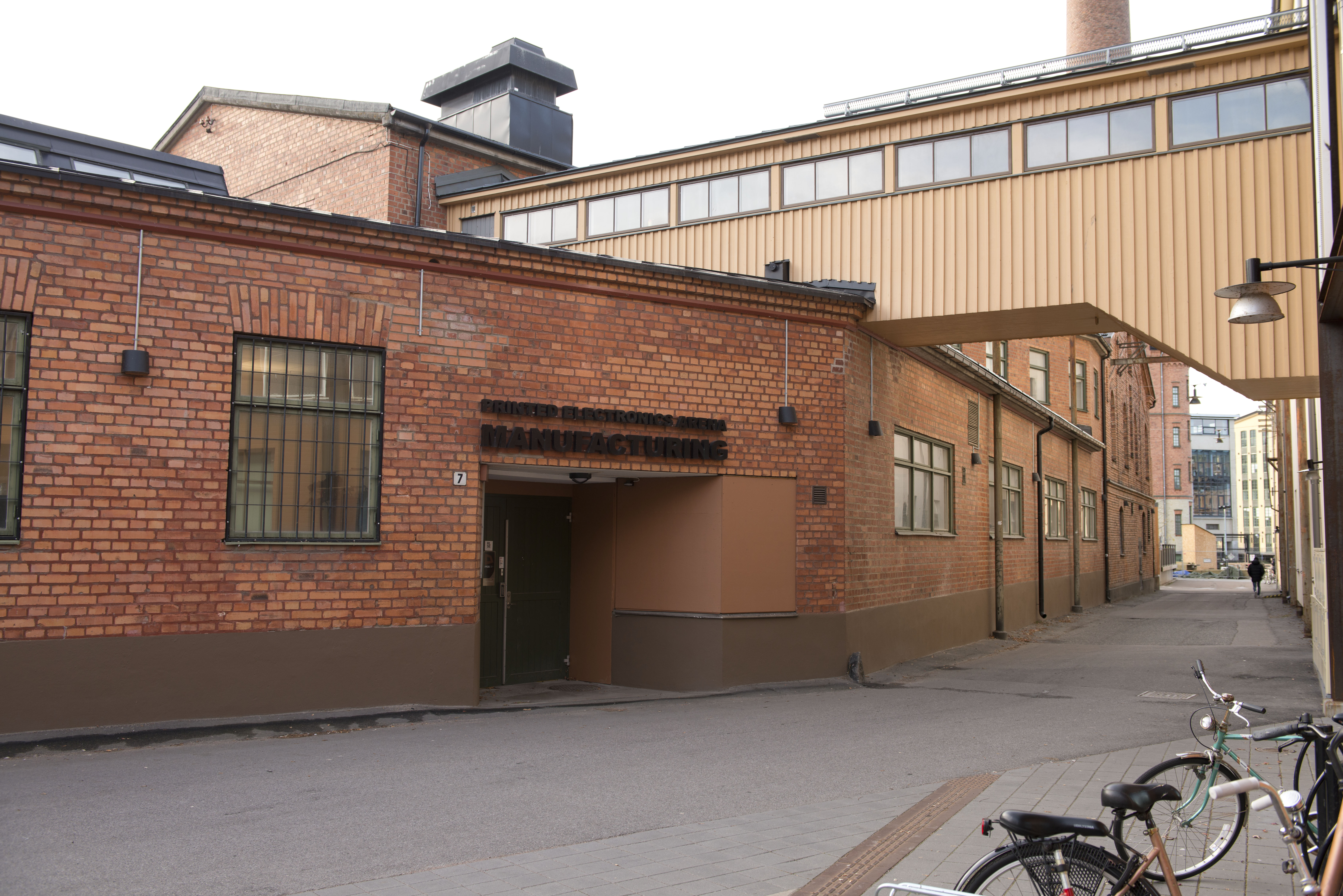 PEA i Norrköping